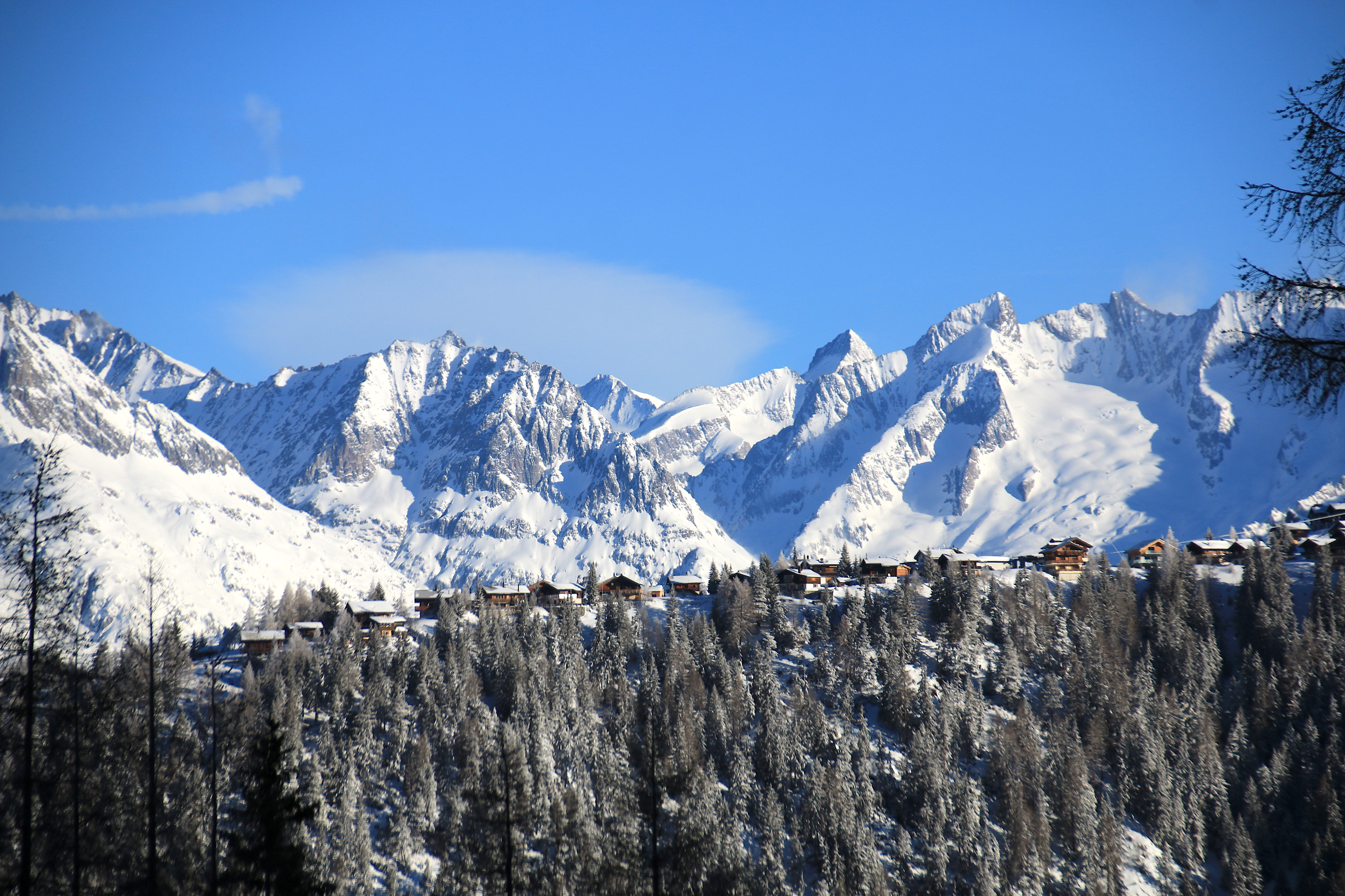 Rosswald (2019)